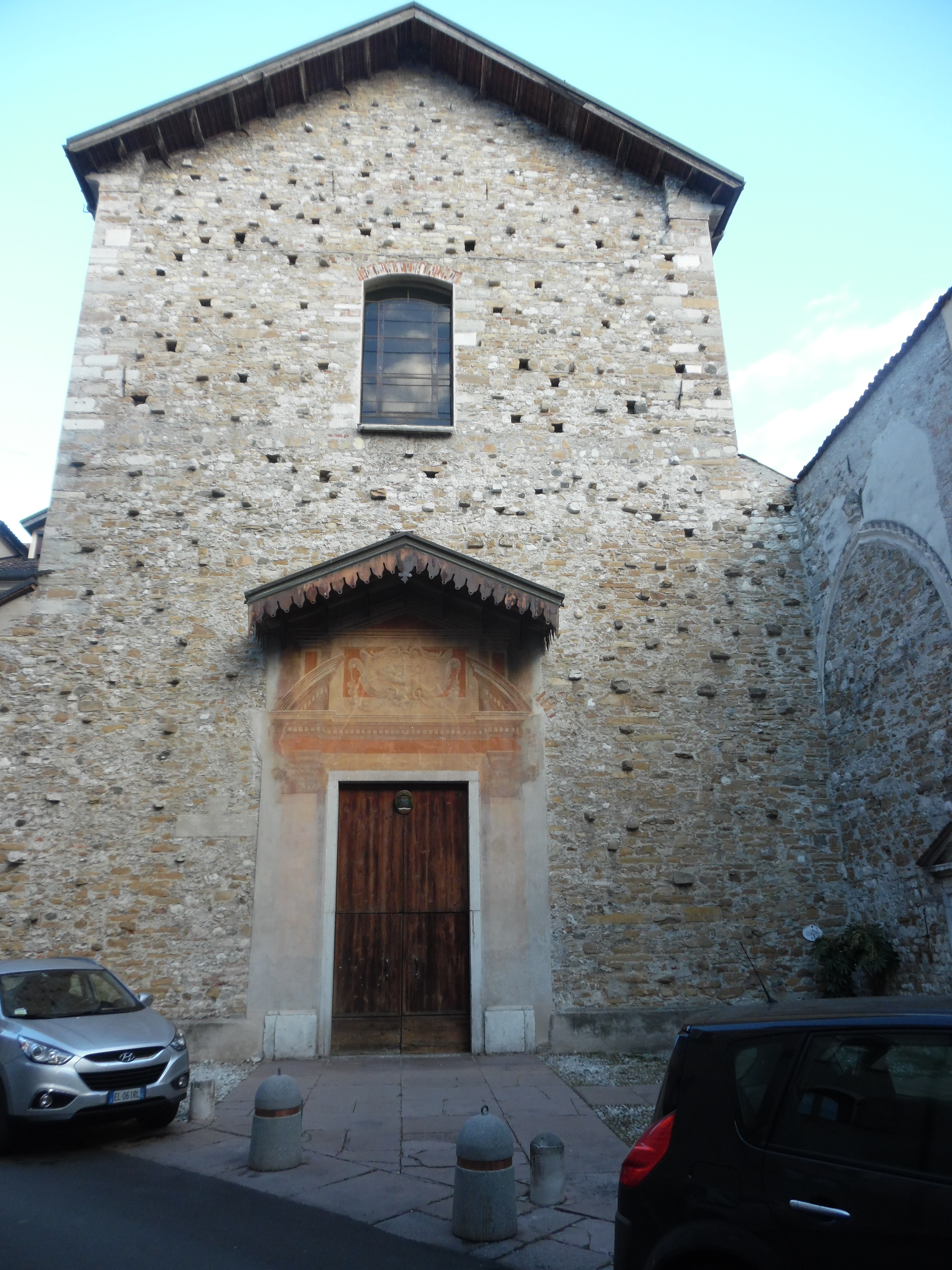 Autore : A. Roldo